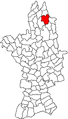 Categorie:Hărţi ale judeţului Olt